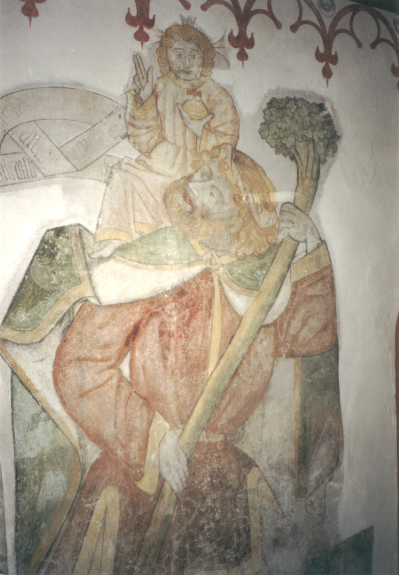 Spätgotische Darstellung des Heiligen Christophorus in der Kirche in Hohensolms